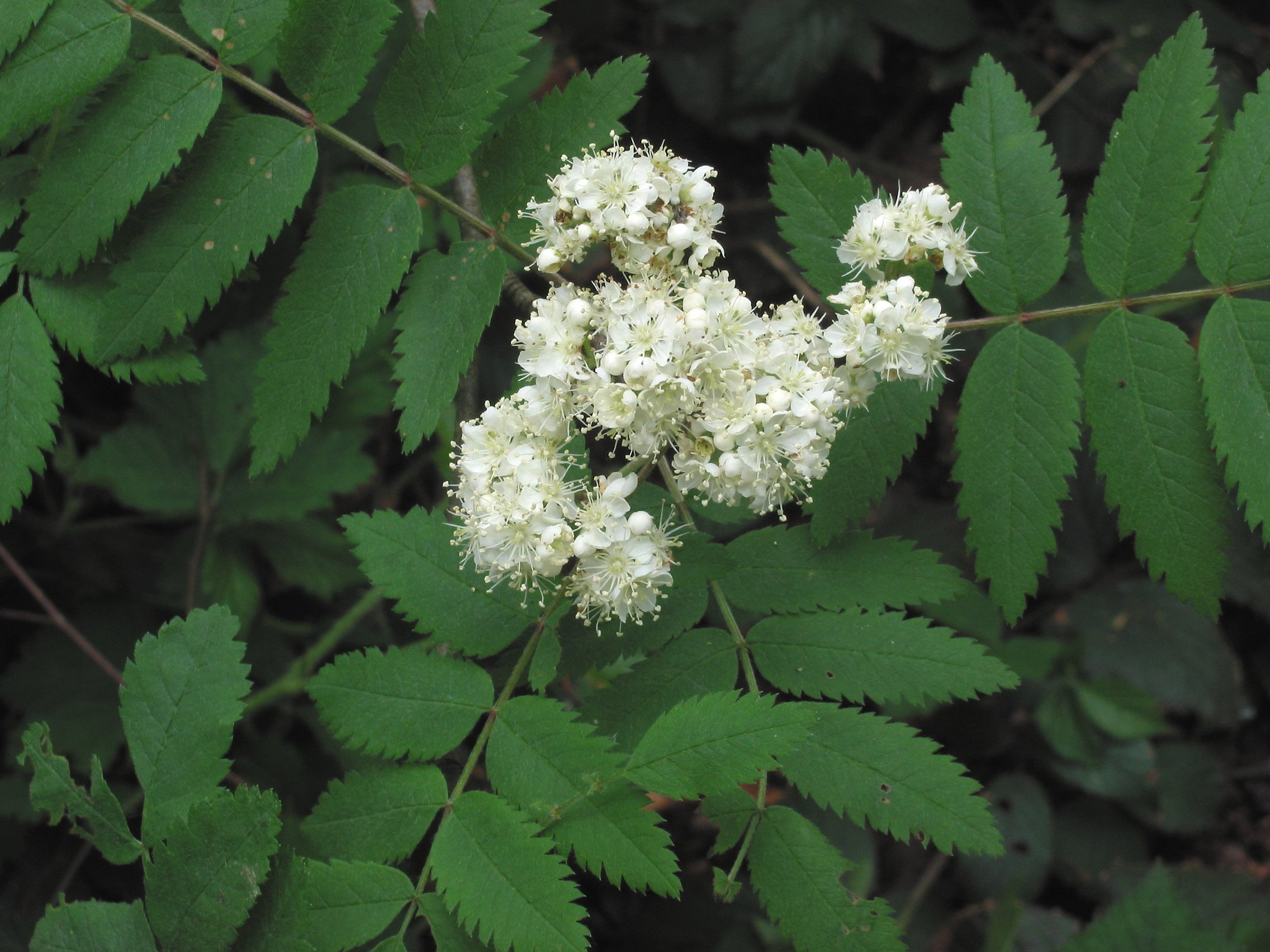 Picture taken by myself: Sorbus aucuparia (Wilde lijsterbes bloeiwijze)